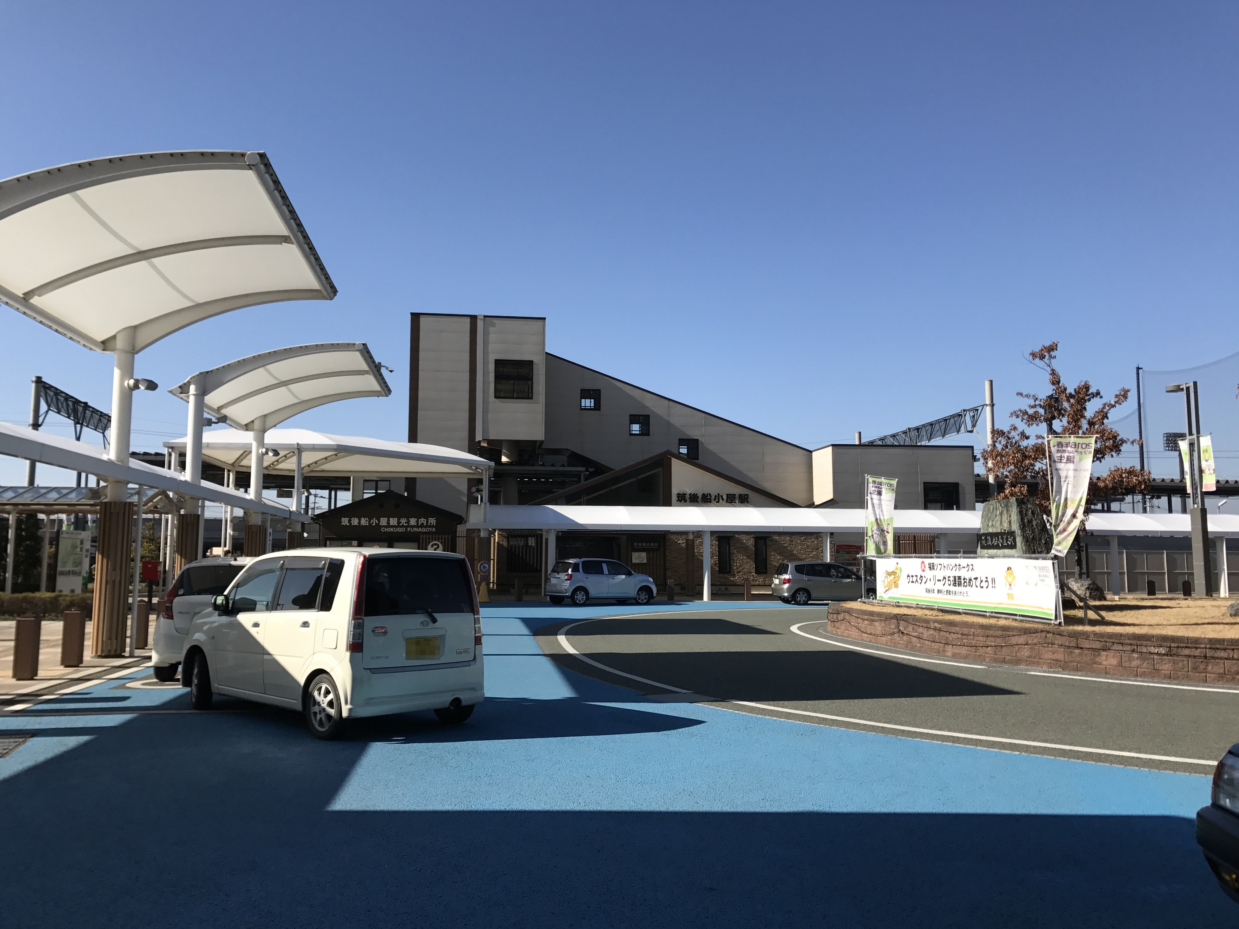 筑後船小屋駅の鹿児島本線駅舎